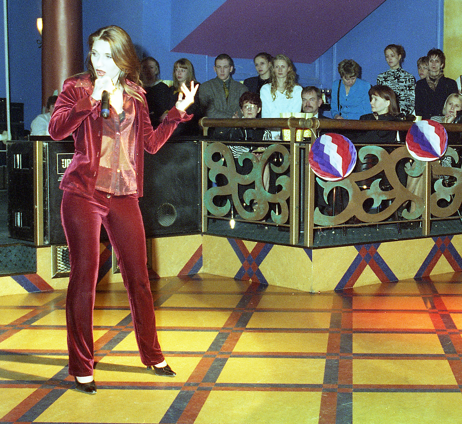 Janika Sillamaa Club Hollywoodis 1998